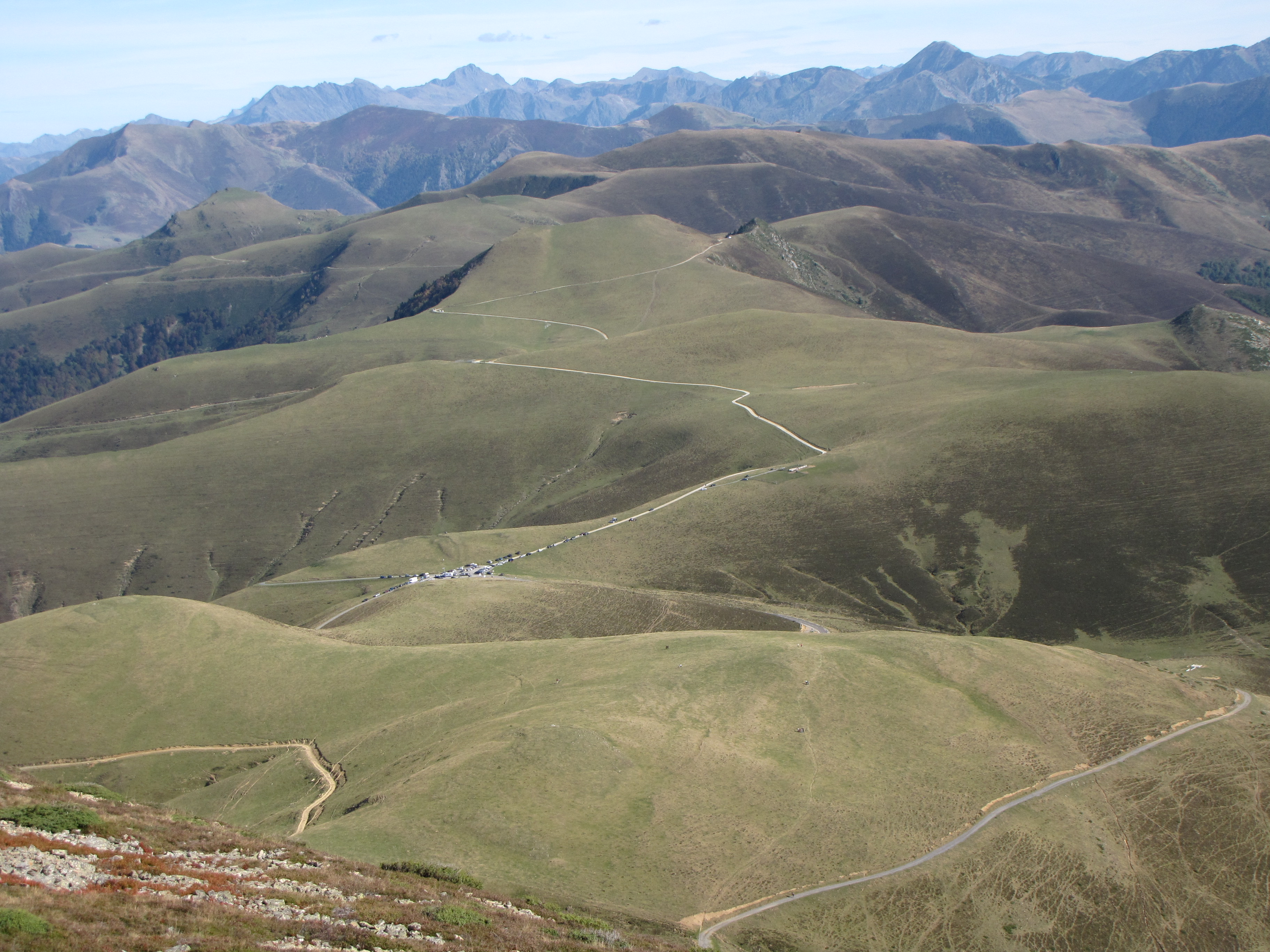 Le port de Balès (croix formée par les voitures) vu du sommet du mont Né. C'est un col qui fait communiquer les Hautes-Pyrénées (à gauche) et la Haute-Garonne (à droite).